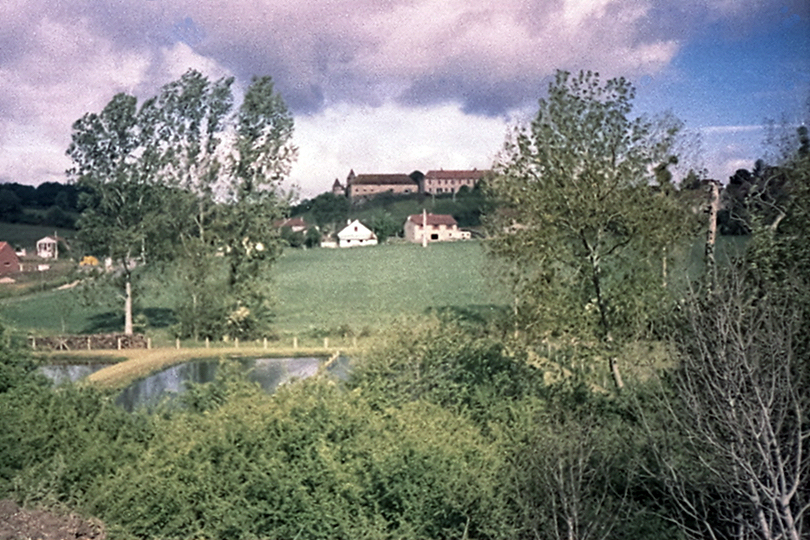 Vue du Bourg de Brugheas avec son chateau